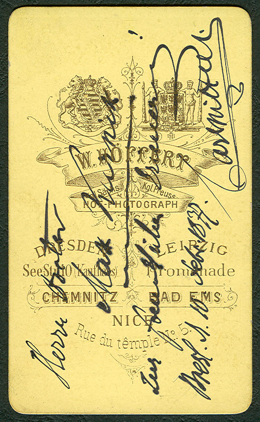 Rückseite der Carte de Visite von Carl Mittell: Unter den Wappen vom Königreich Sachsen und vom Königreich Preussen der Zudruck "W. Höffert Kgl. (königlich) Sächs. (sächsischer) Kgl. Preuss. (preußischer) Hof-Photograph" mit den Standorten Dresden, Seestraße 10 (Kaufhaus), Leipzig, Promenade, Chemnitz, Bad Ems und Nice, Rue du temple No. 5.